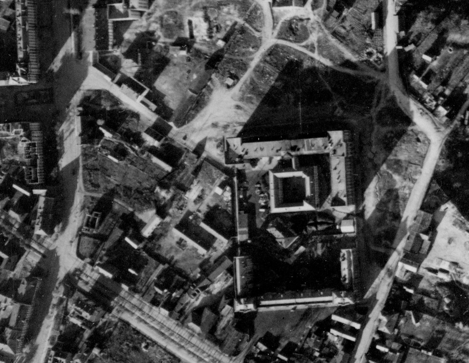 Магілёў. Нямецкі аэрафотаздымак